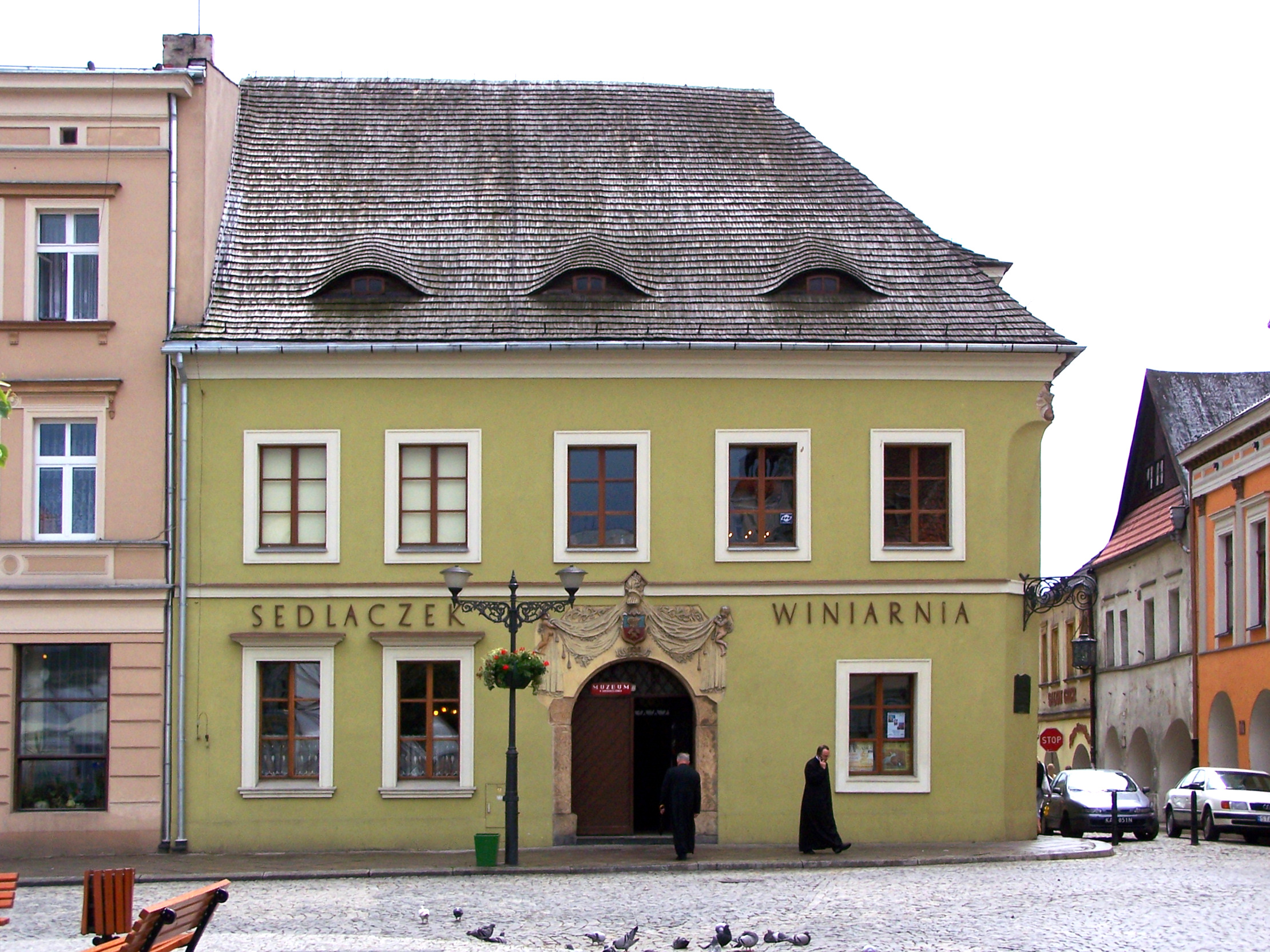 Winiarnia Sedlaczek przy Rynku w Tarnowskich Górach.